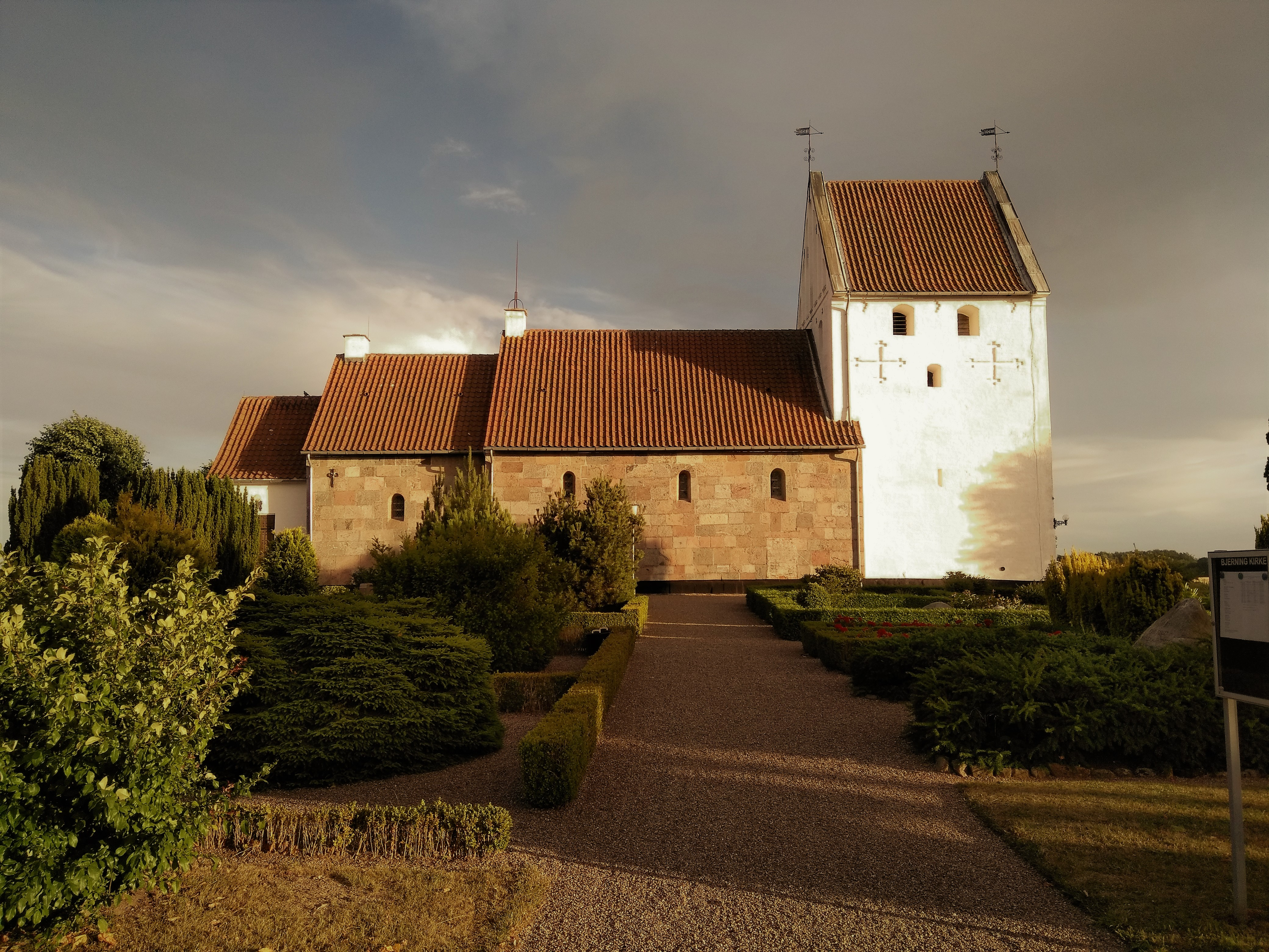 Vaade kirikule põhjasuunast. Paremalt vasakule torn, pikihoone, koor ja käärkamber.